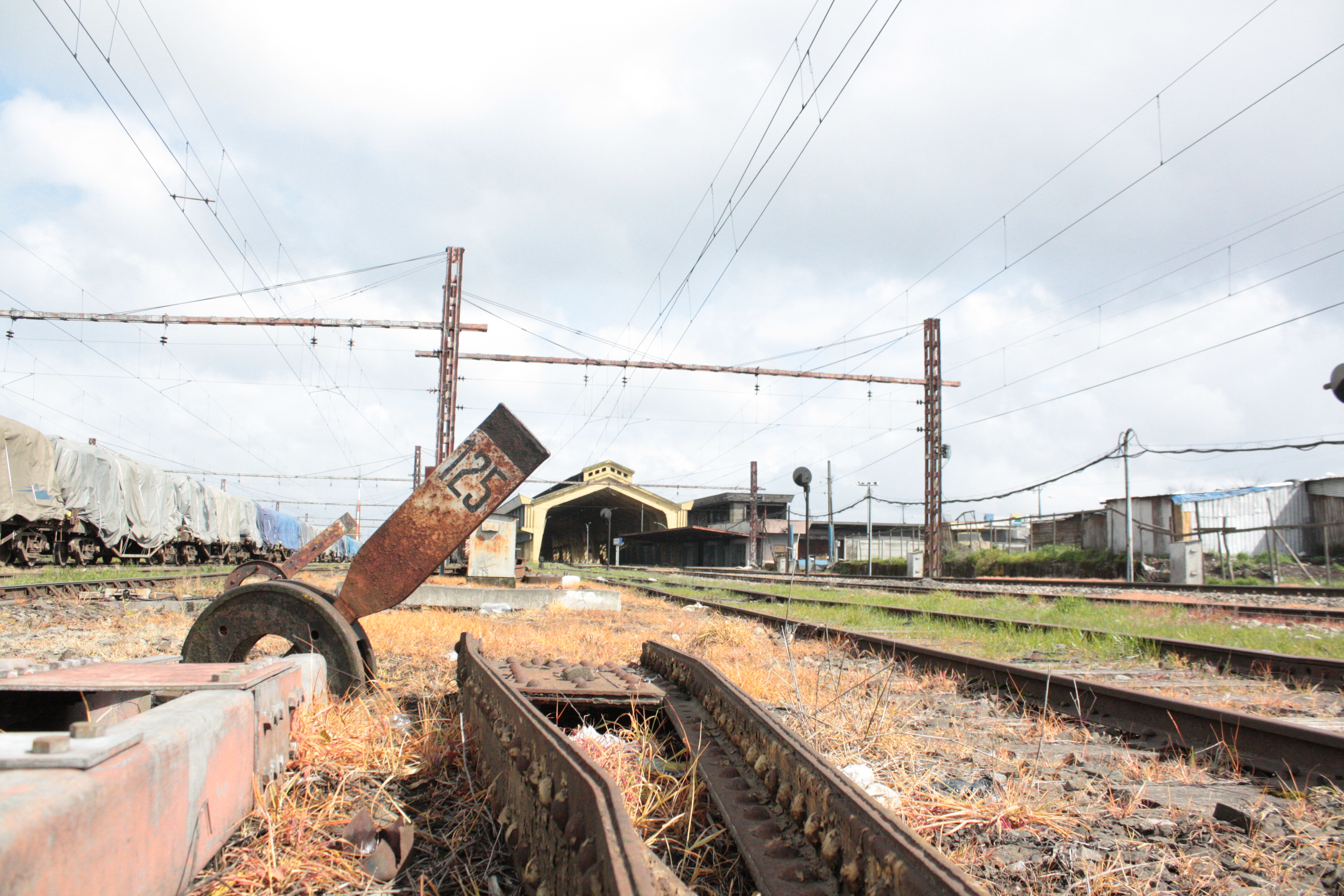 Entrada a la estación de Temuco